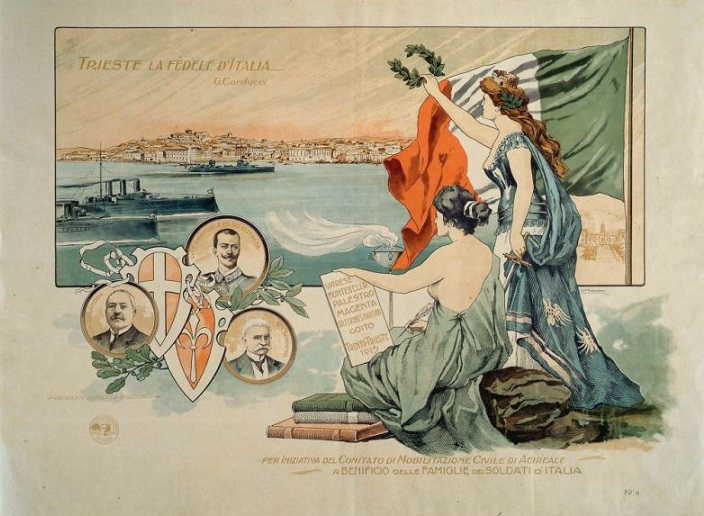 "Trieste la fedele d'Italia", manifesto, 57 x 78 cm.